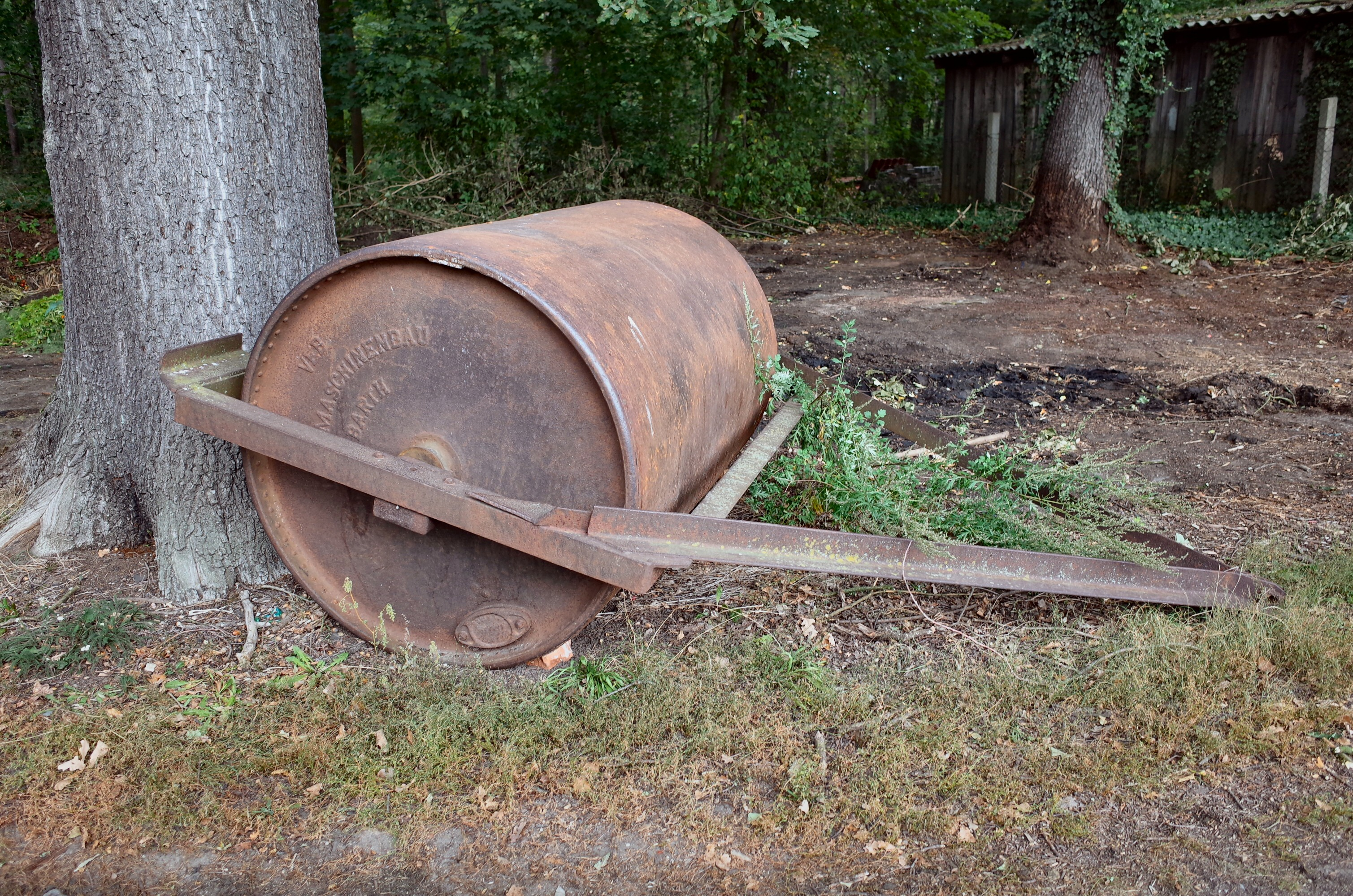 Glattwalze, Wiesenwalze. Hergestellt im VEB Landmaschinenbau Barth.